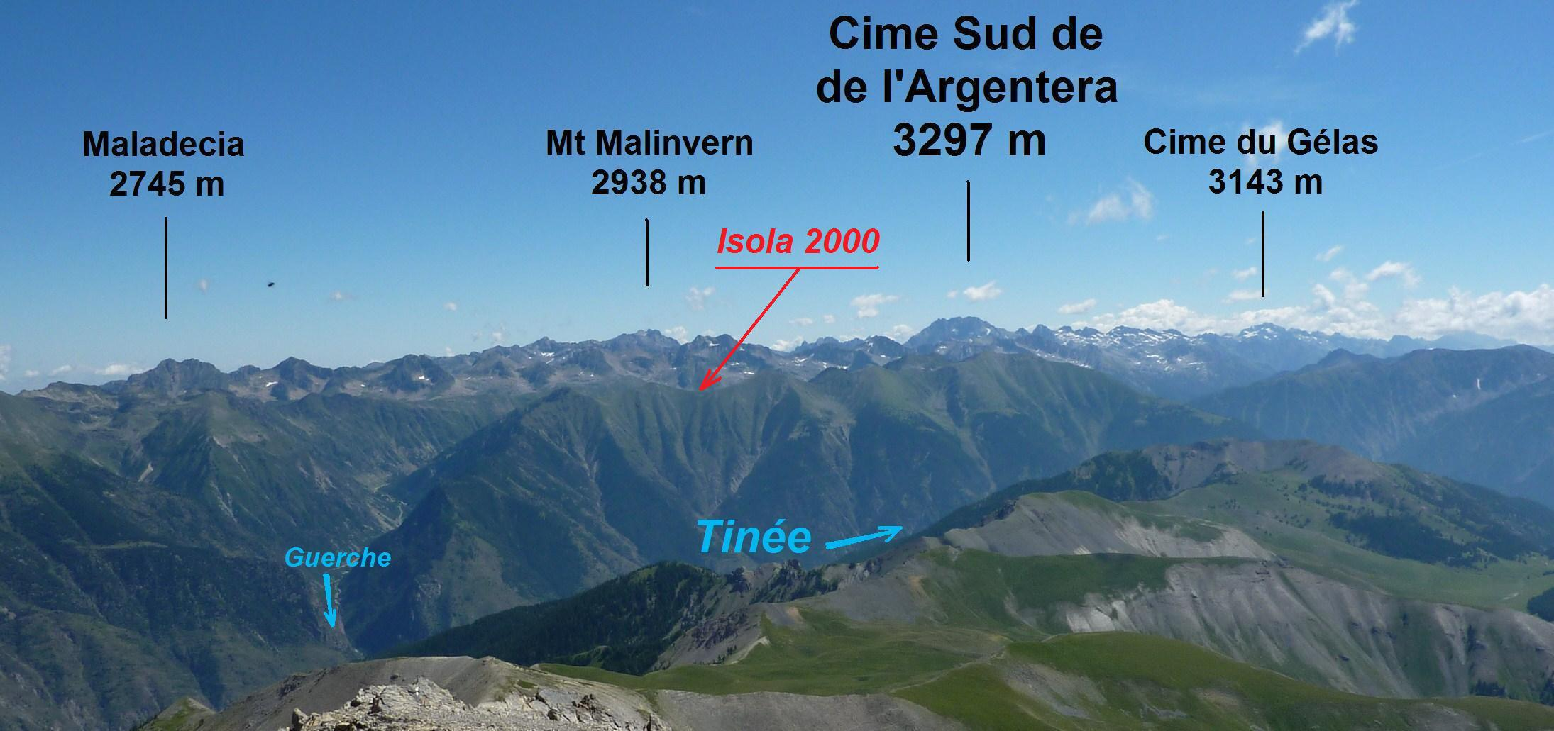 Panorama légendé de la partie centrale du massif franco-italien du Mercantour-Argentera vue de l'ouest à partir du mont Mounier (2817 m). Photographie prise du mont Mounier (06 - FRANCE) vers l'Est le 27 juillet 2010 à 12h01 par André Payan-Passeron.